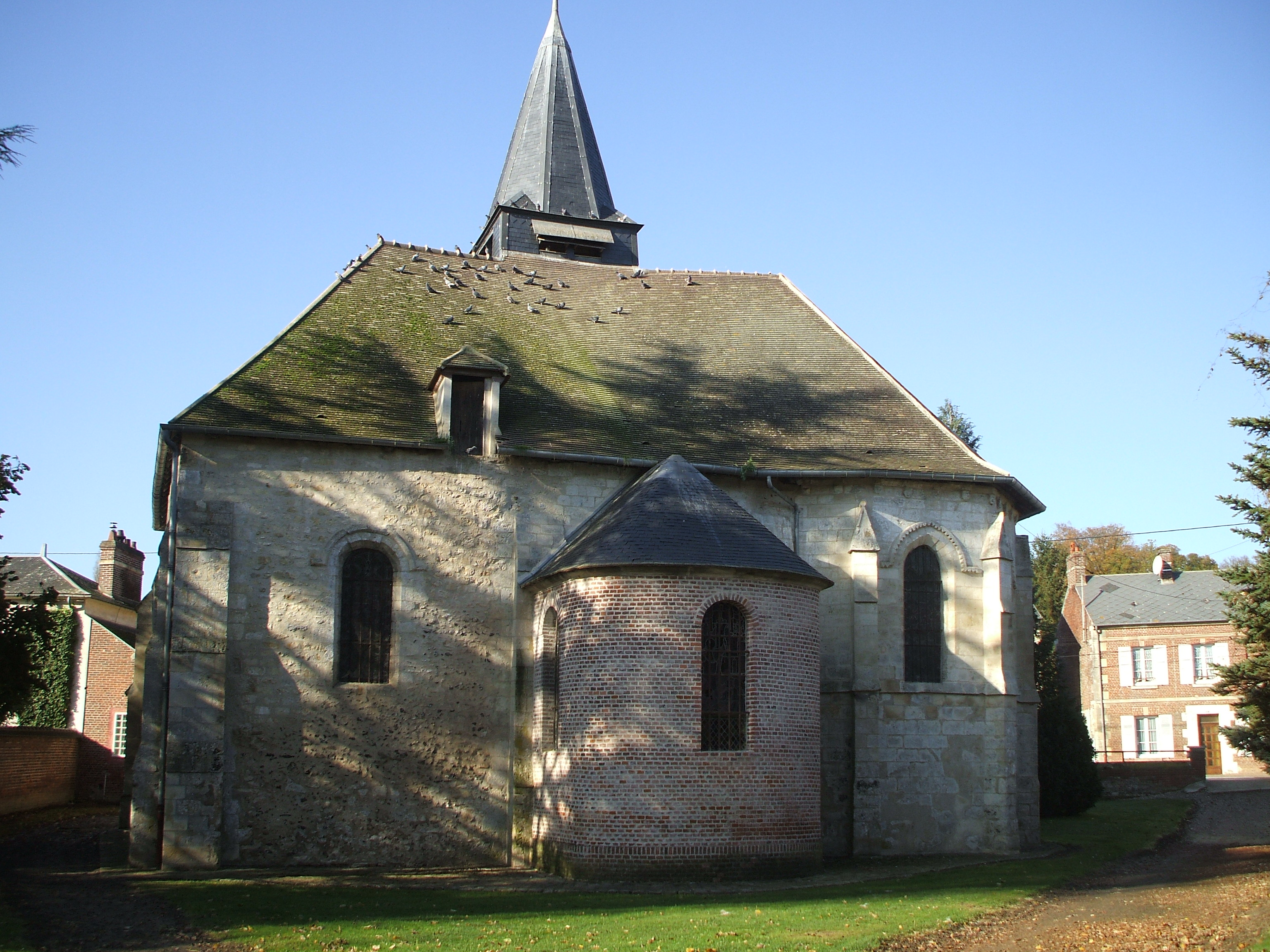 église de Puiseux-le-Hauberger oise france